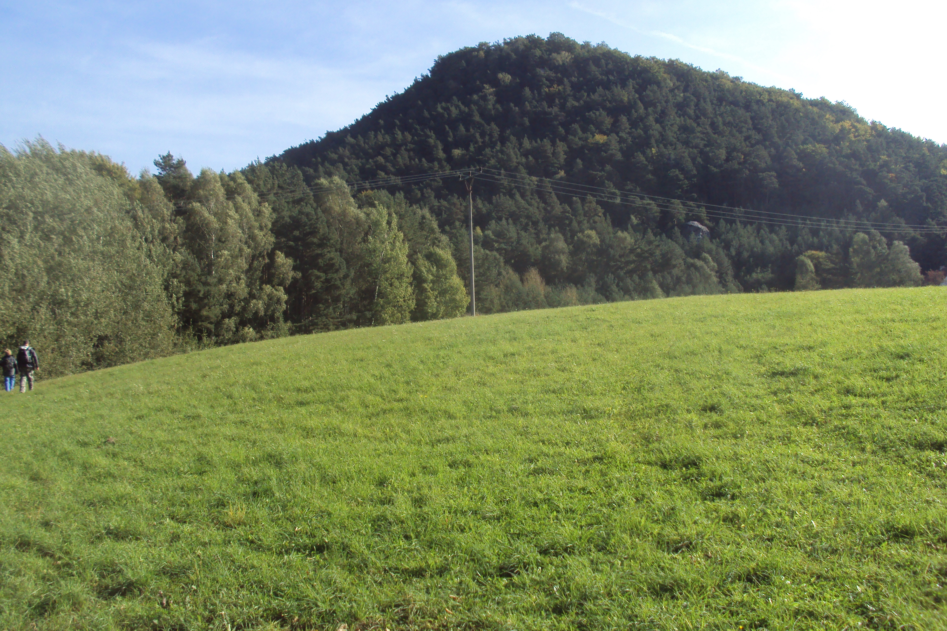 Pohled na kopec ze západu